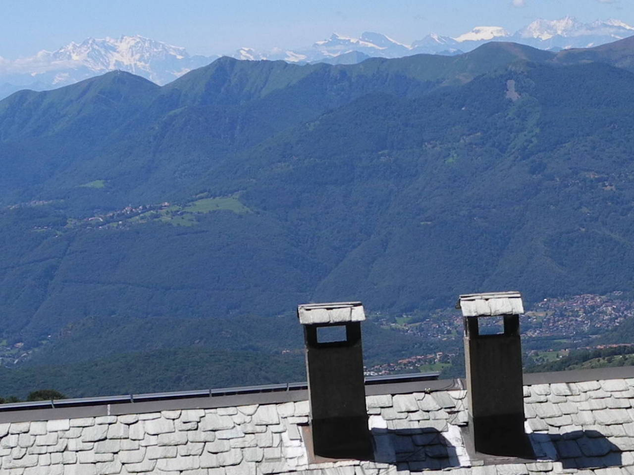 Capanna Pairolo, Cimadera TI, Schweiz